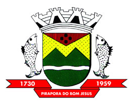 Brasão de Armas do Município de Pirapora do Bom Jesus no Estado de São Paulo, Brasil./Coat of Arms of the city of Pirapora do Bom Jesus, São Paulo, Brazil.